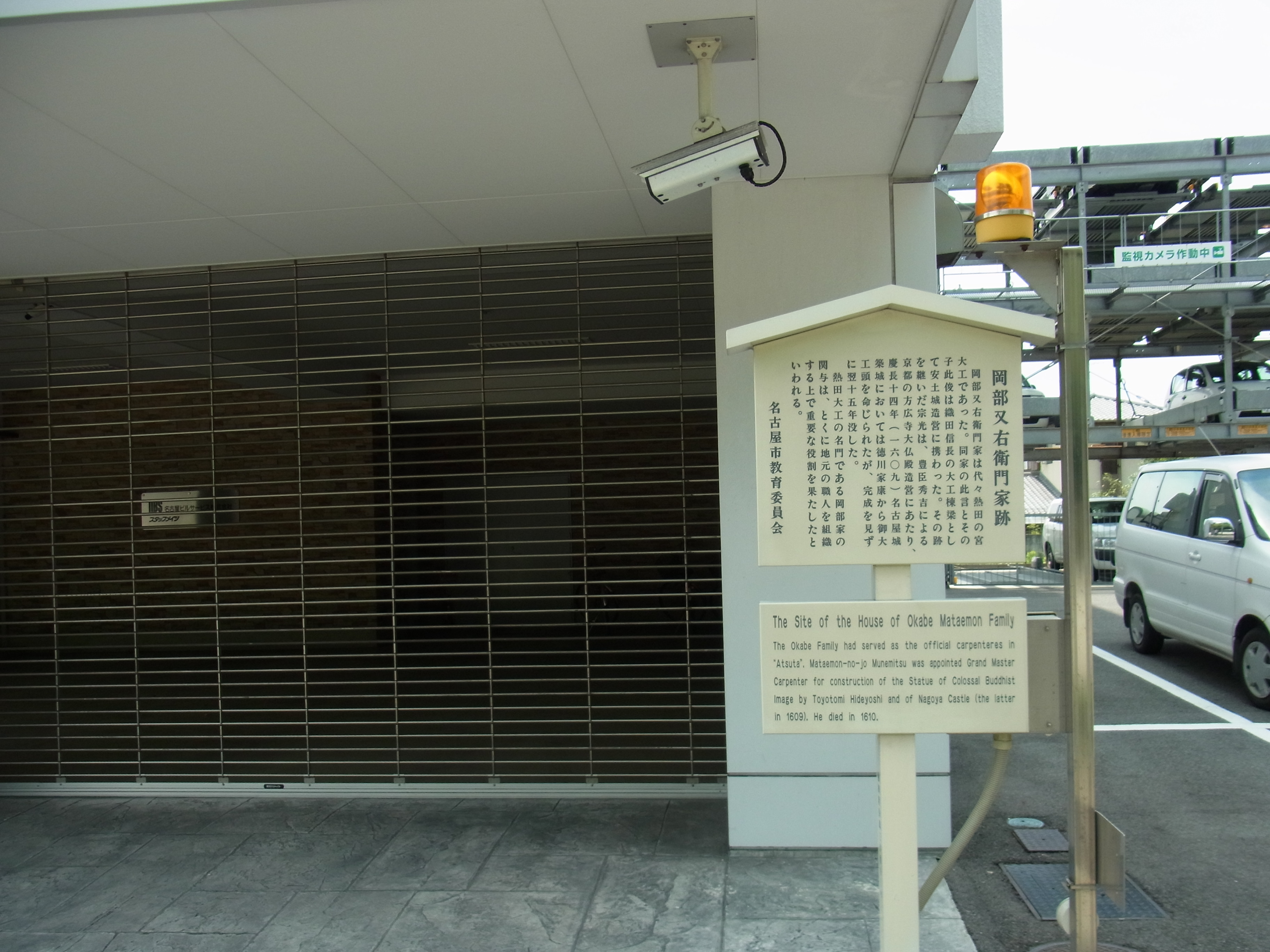 岡部又右衛門出生地